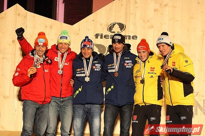 Dekoracja medalowa sprintu drużynowego HS 134/2×7.5 km